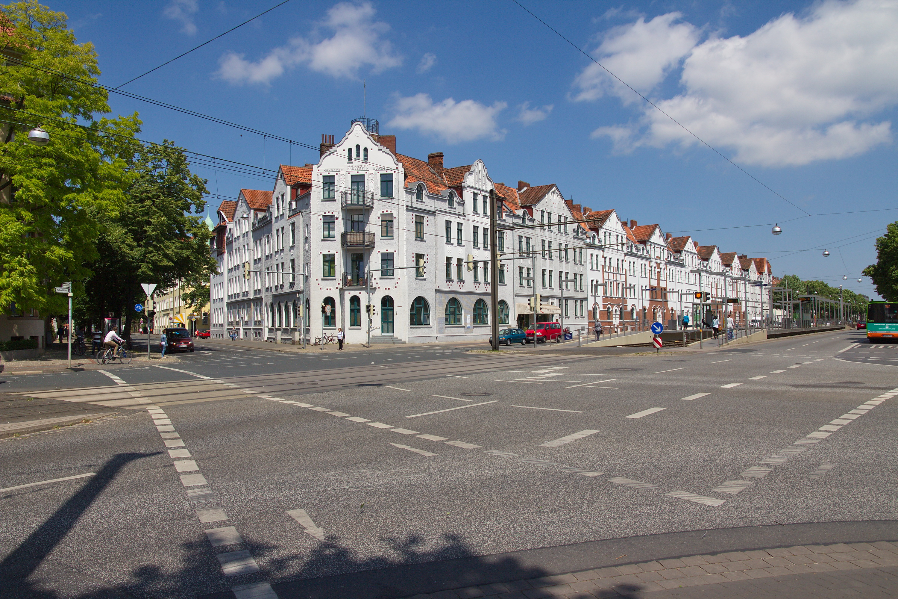 Spannhagenstraße-Podbielskistraße (Hannover), Niedersachsen, Deutschland.